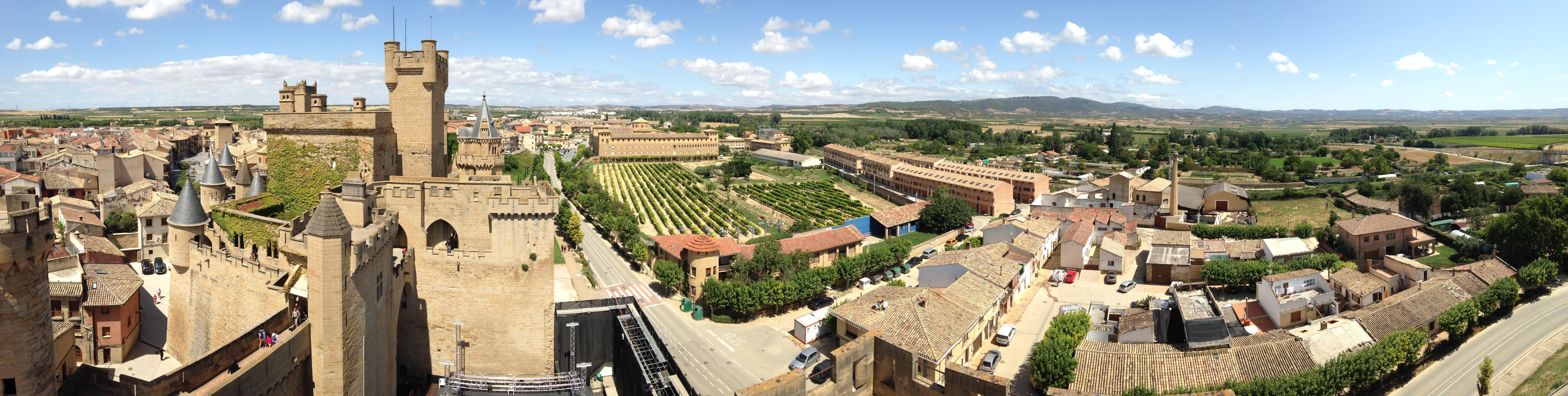 Ikuspegi panoramikoa Erriberriko Errege Jauregitik, Erriberri (Nafarroa)